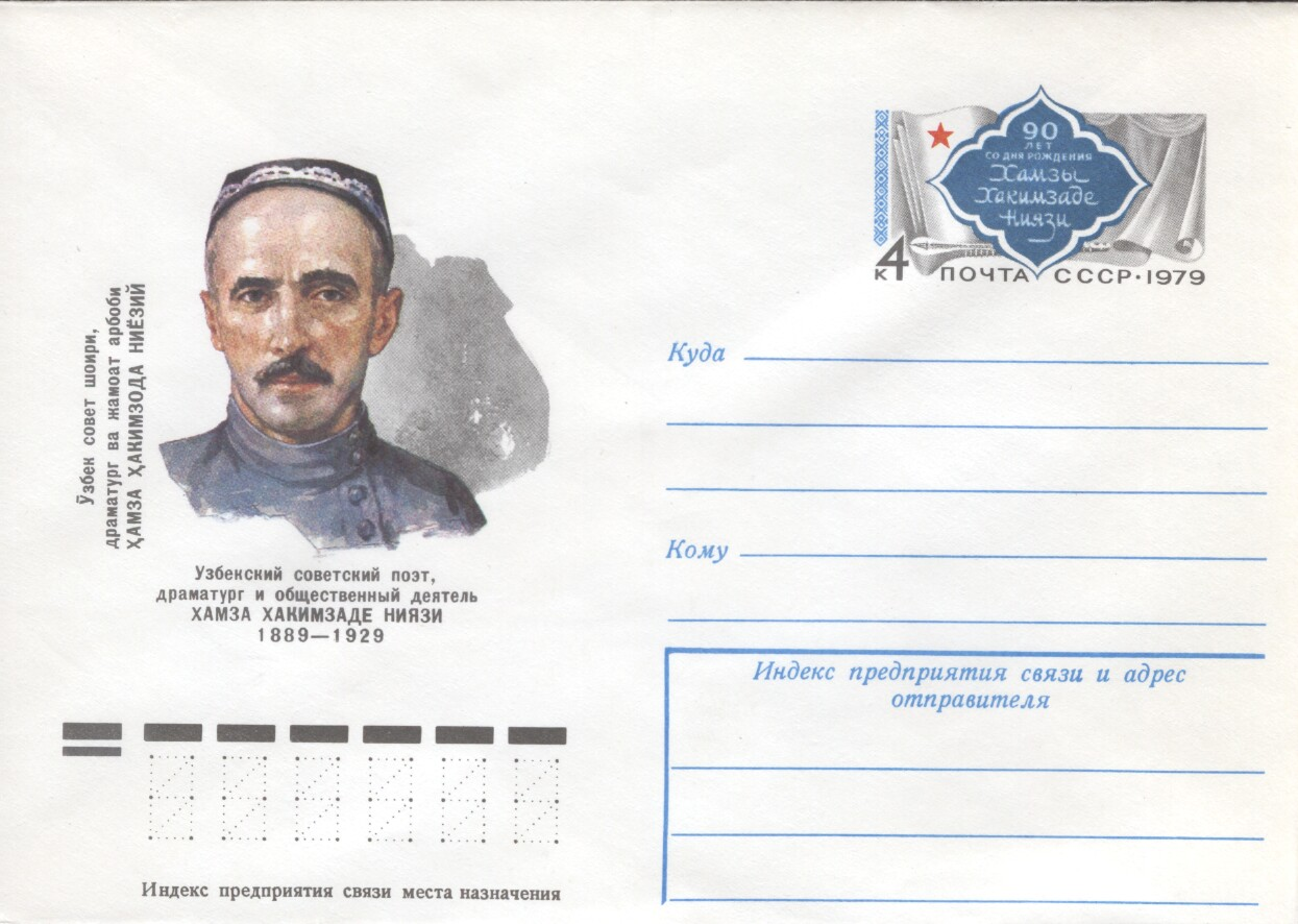 Почтовый конверт СССР - 90 лет Хамза Ниязи